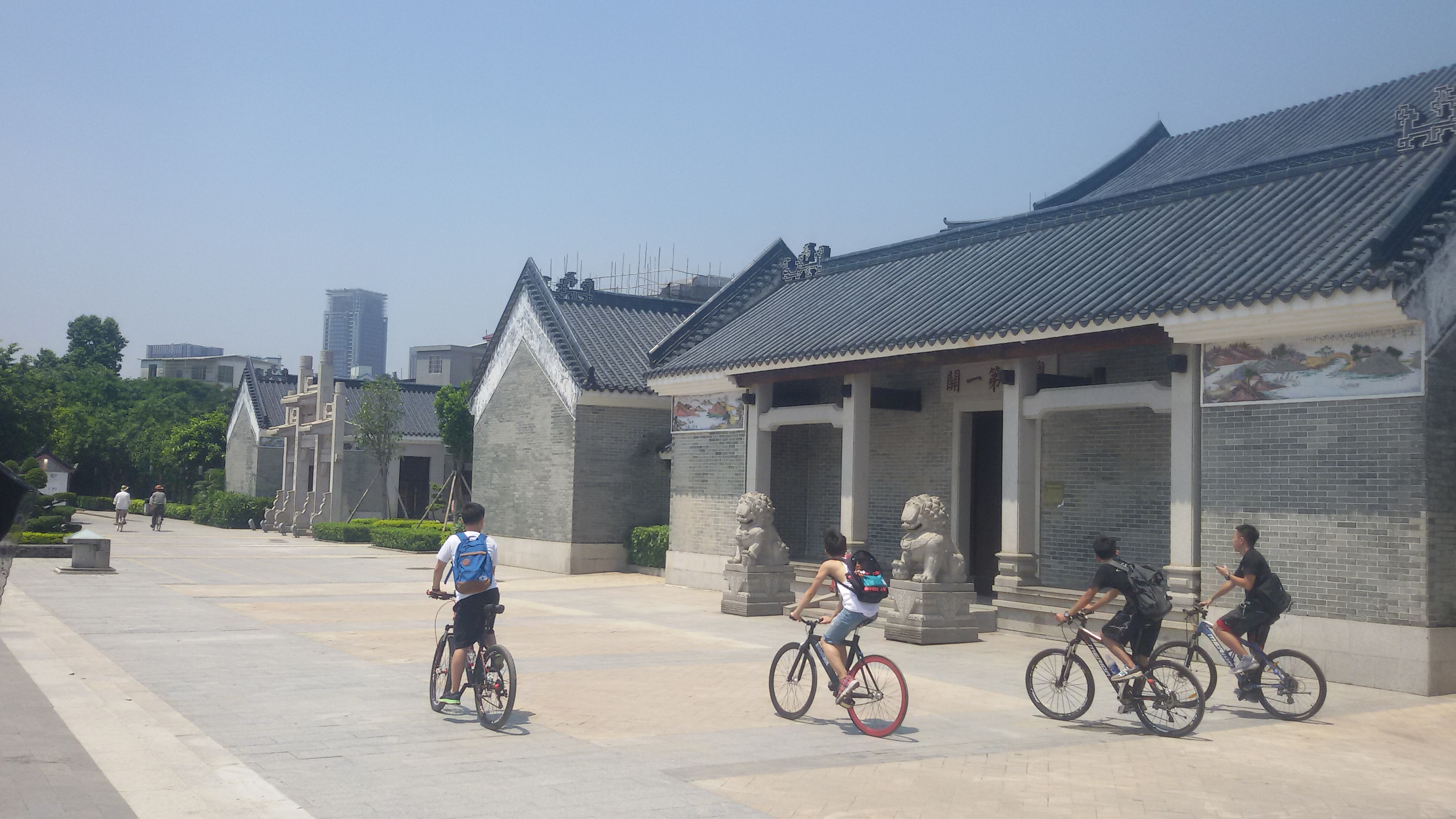 粵語: 粵海第一關紀念館